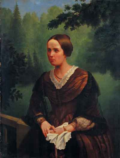 Ekaterina Chomjakova (1817-1852), moglie di Aleksej Chomjakov (1804-1860)